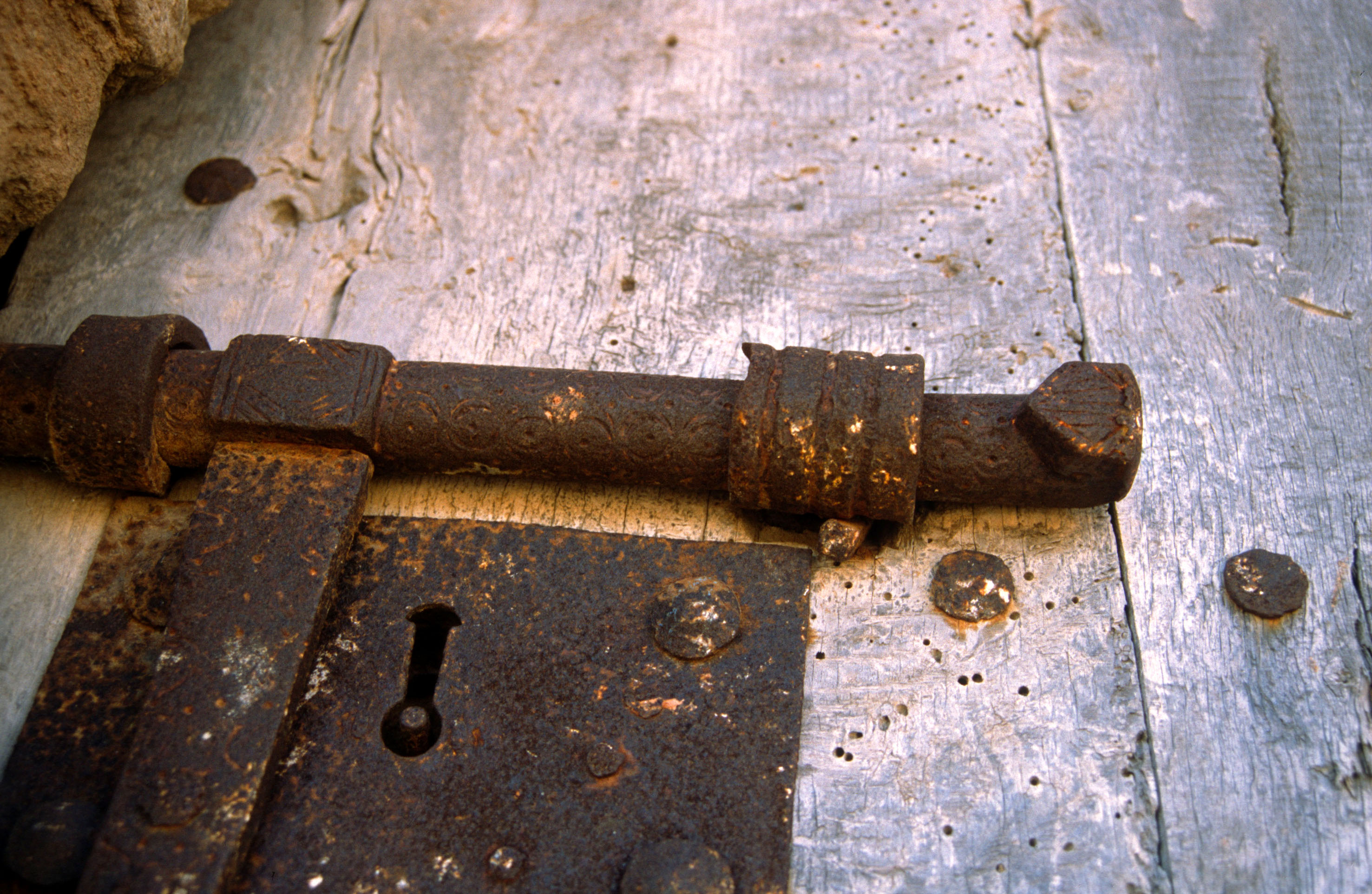 Castell de Barberà. Forrellat d'una porta, marcat a l'extrem dret amb l'escut del gran prior fra Guillem de Guimerà (és el mateix de l'ossera de la fotografia superior).